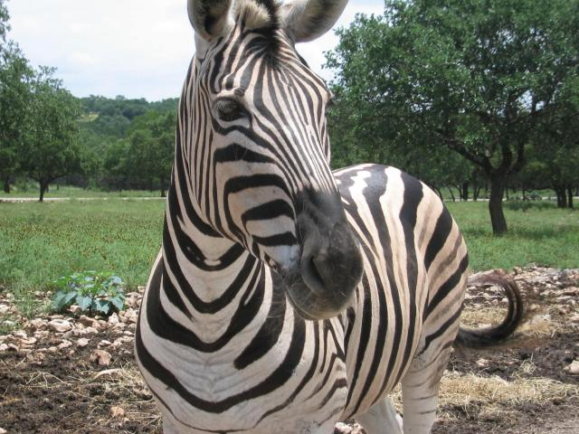 A zebra.